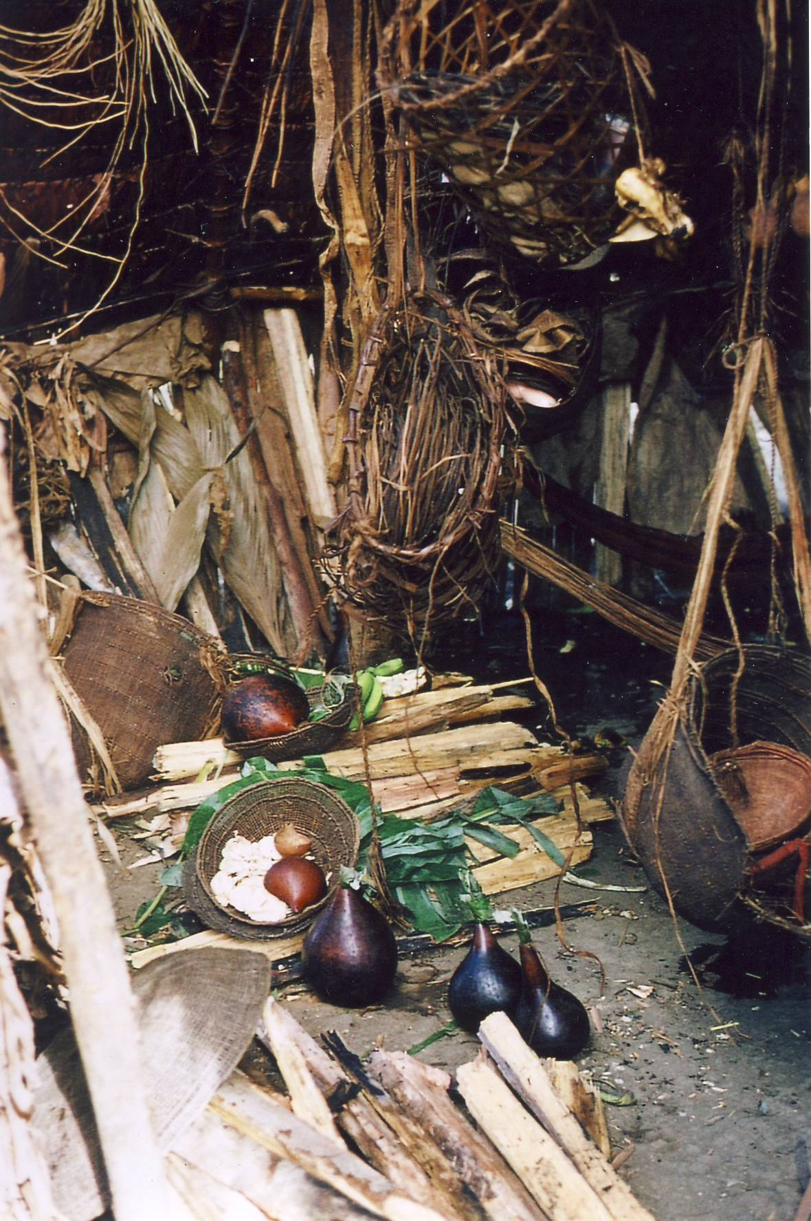 Inneres eines Schabono 1